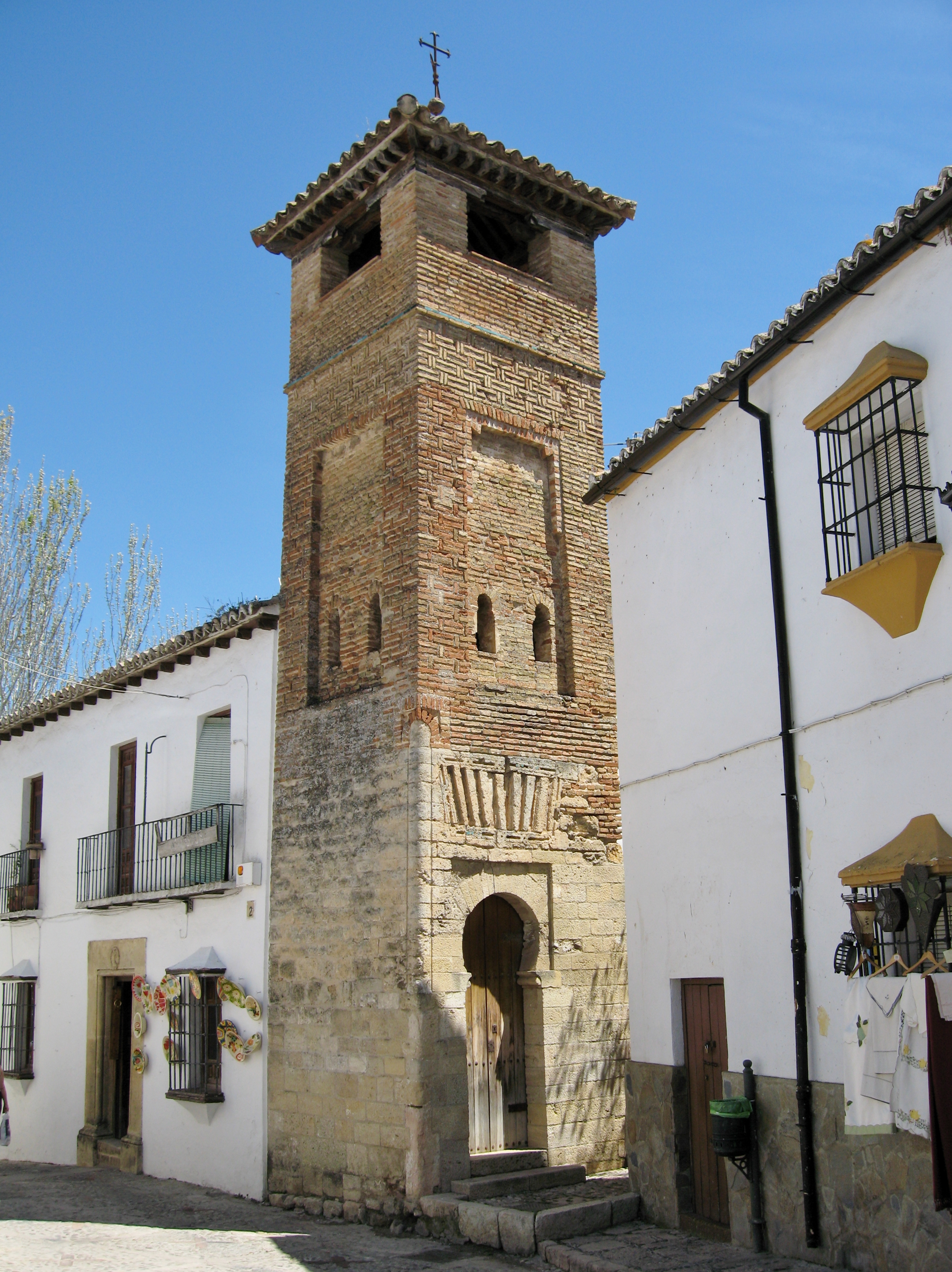 Minarett von San Sebastián in Ronda, Provinz Málaga, Andalusien, Spanien